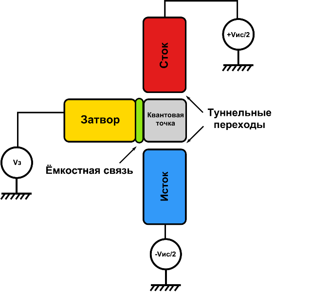 Схема одноэлектронного транзистора. Взята из английской и модифицирована для русскоязычной Википедии.